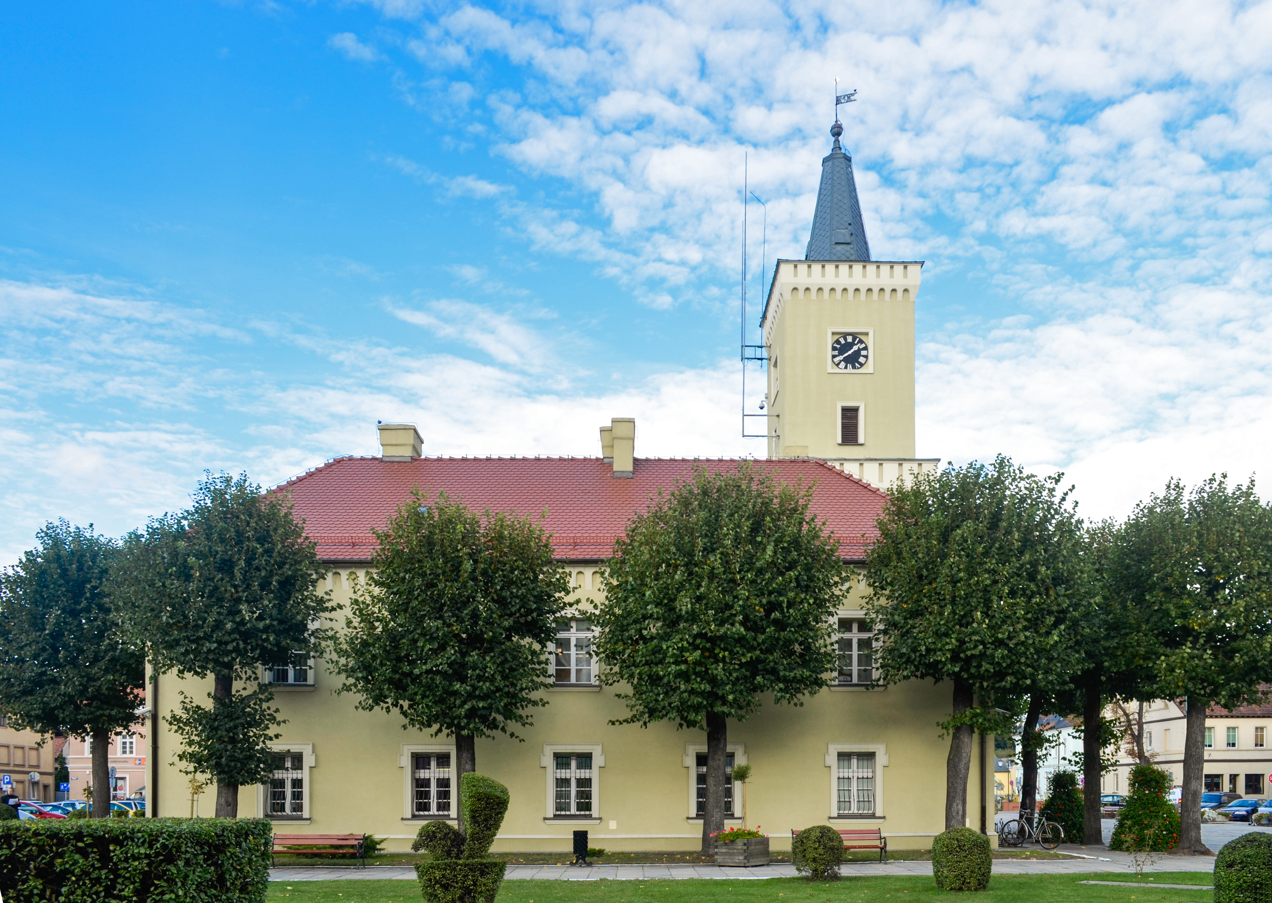 Kargowa, ratusz, XIX